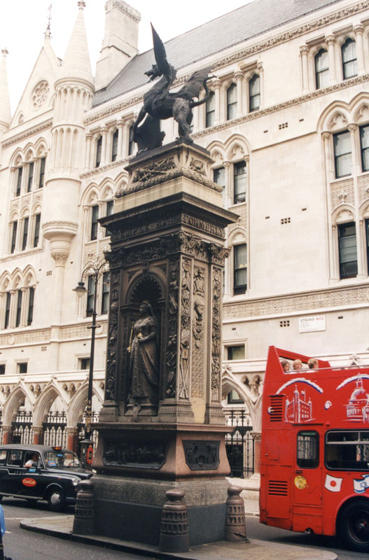 Der heutige Temple Bar in London: Säule gekrönt von Wappendrachen, der Drachen weist stadtauswärts. Im Hintergrund zu sehen sind die Royal Courts of Justice.